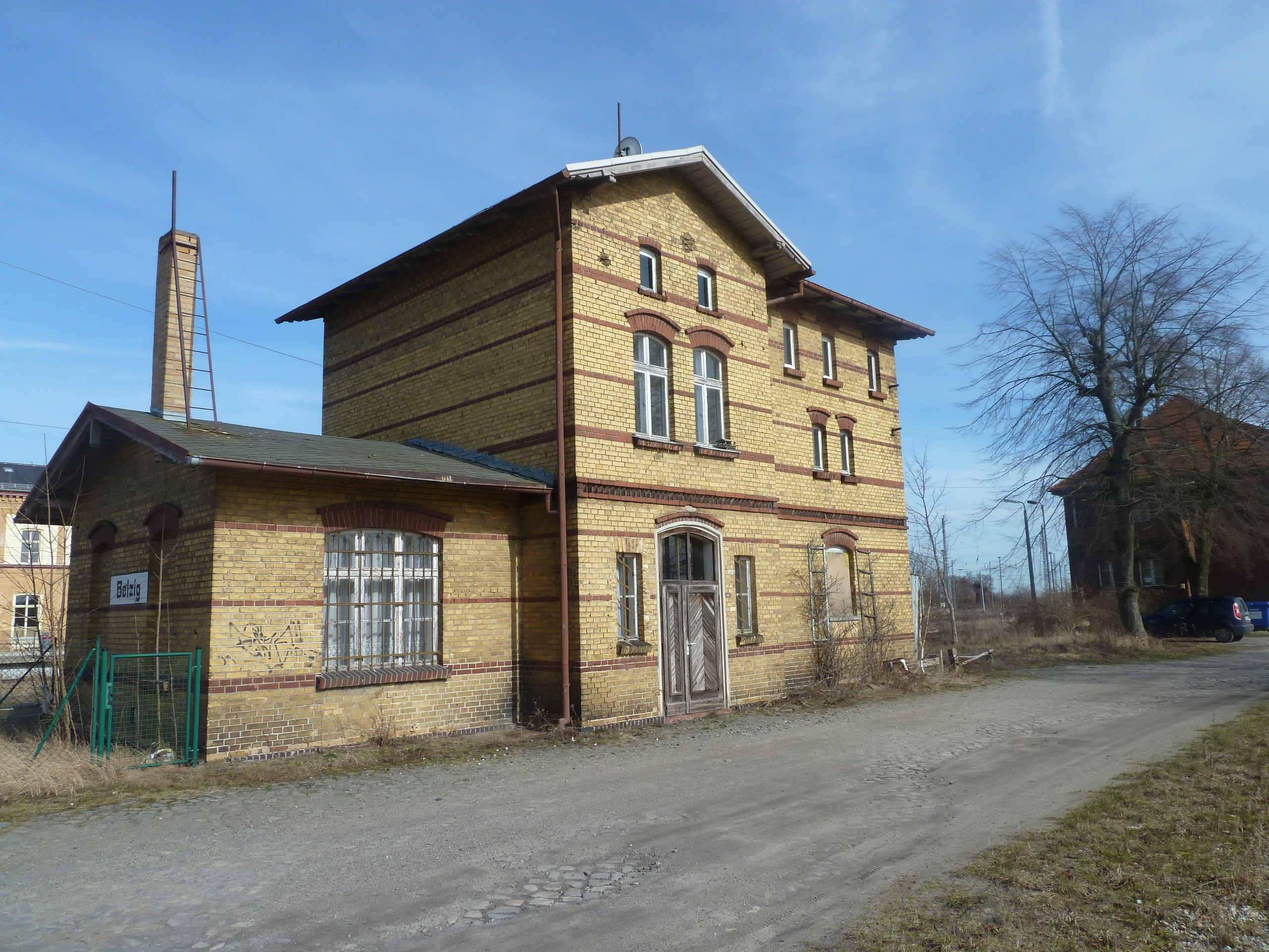 Bf. Belzig, ehemalige Bahnhof der Brandenburgischen Städtebahn, Blick von StraßeUnknown bf. belzig, former part of brandenburgische städtebahn, view from street